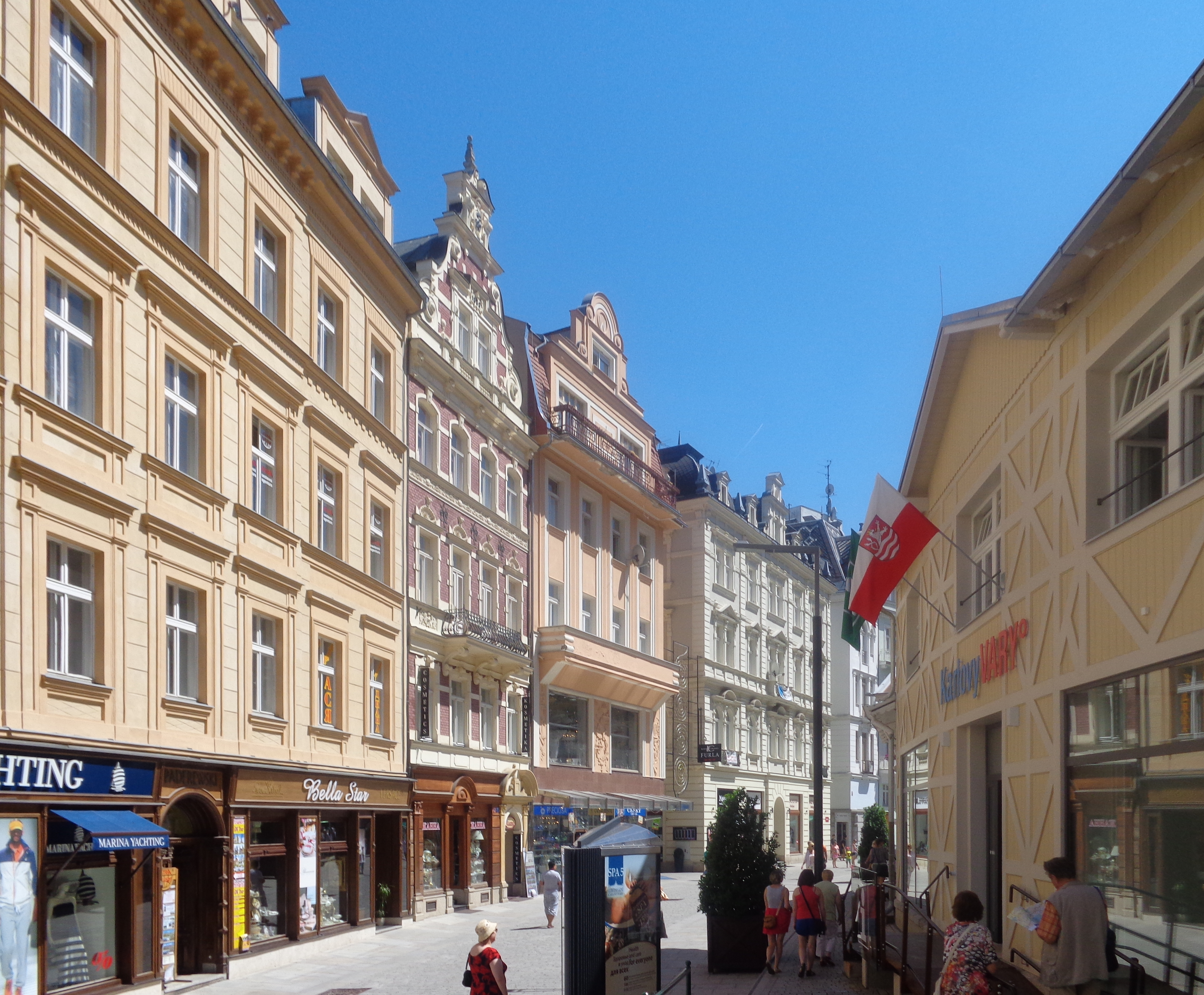 город Карловы Вары, Лазеньска улица